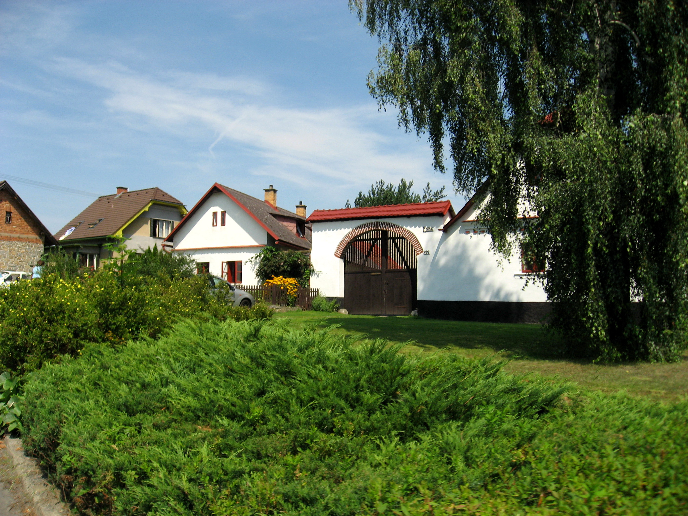 Broumova Lhota